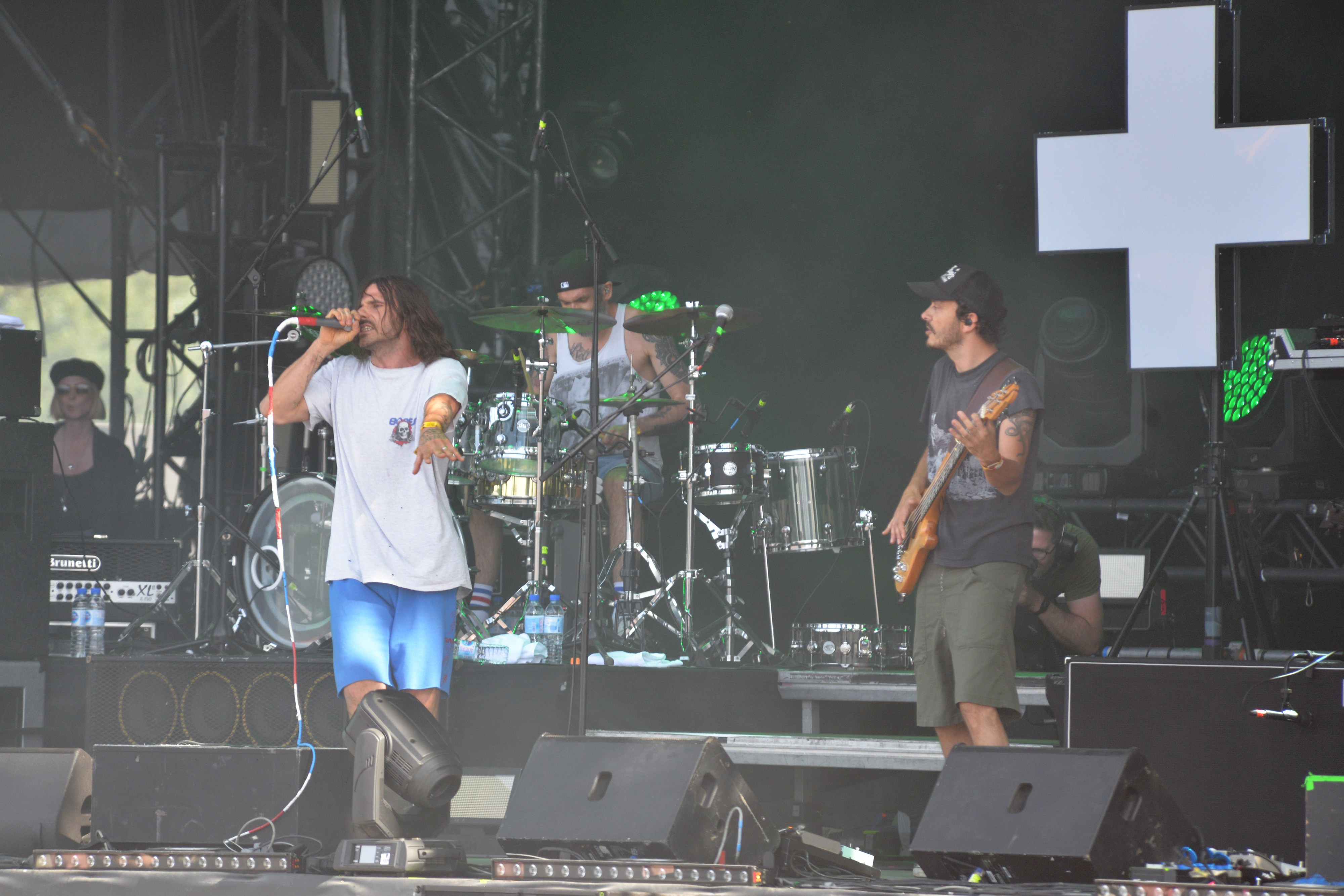 Concert de Pleymo, Hellfest 2018.